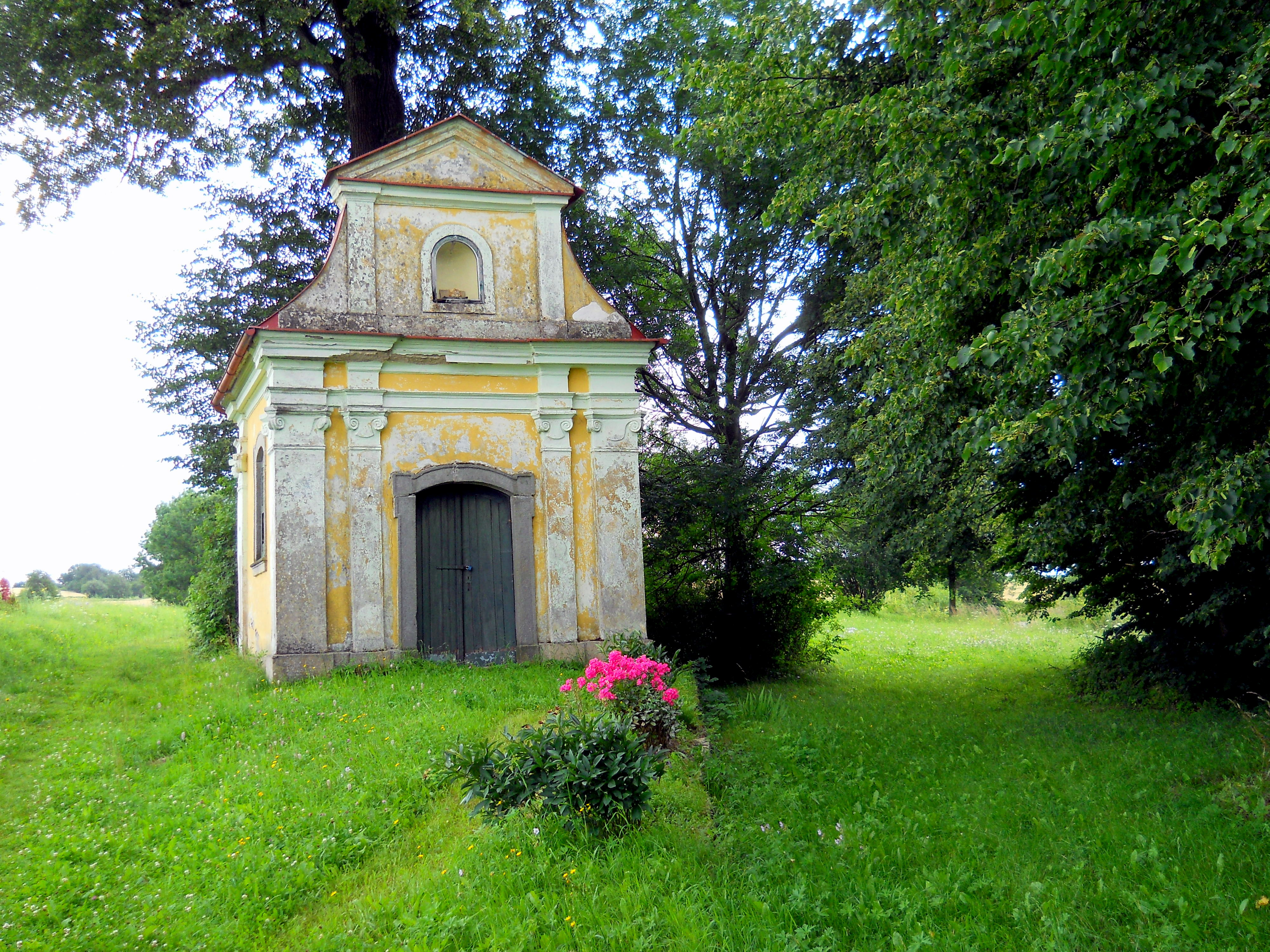 Celkový pohled.